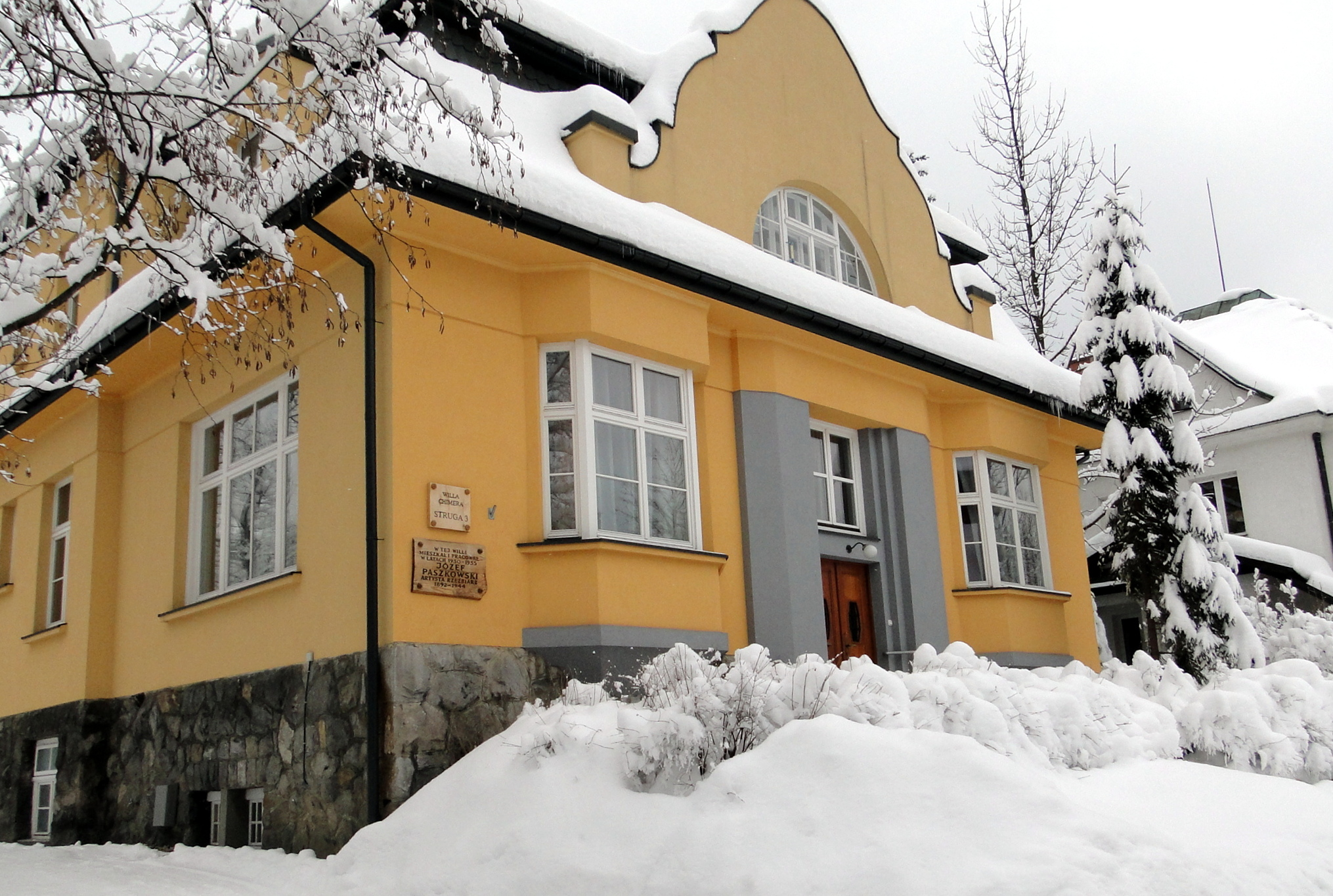 Willa Chimera w Zakopanem (Józef Piotr Mirosław Paszkowski)